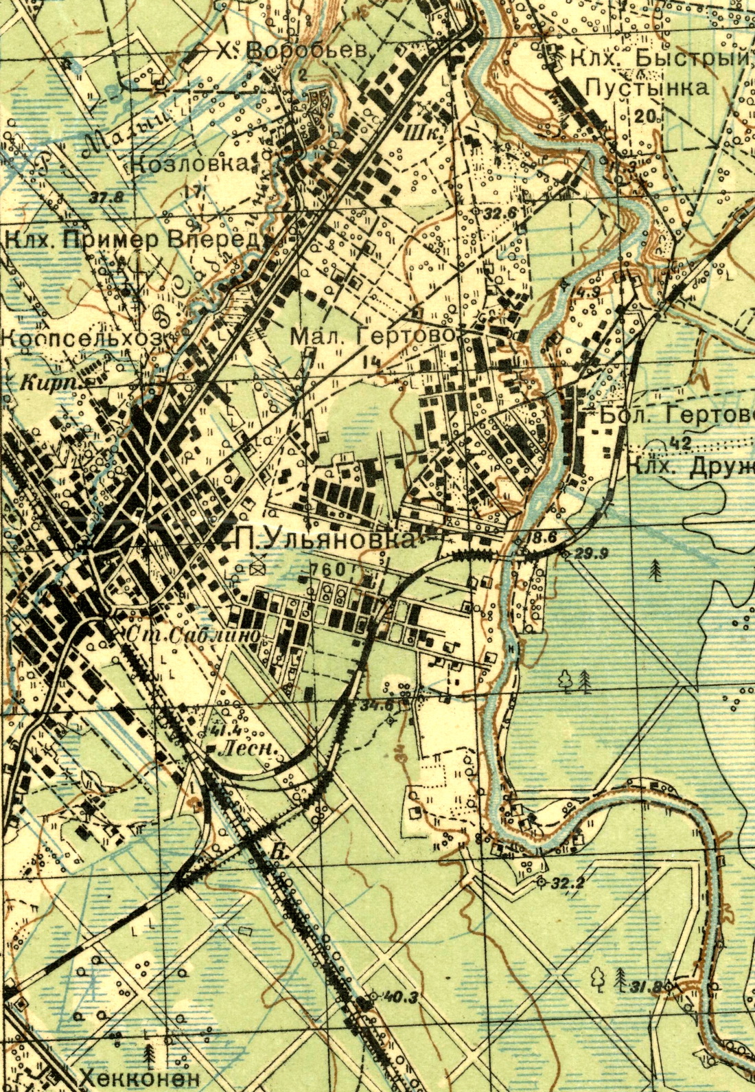 Топографическая карта Ленинградской области, квадрат О-36-14-Б (Тосно), посёлок Ульяновка